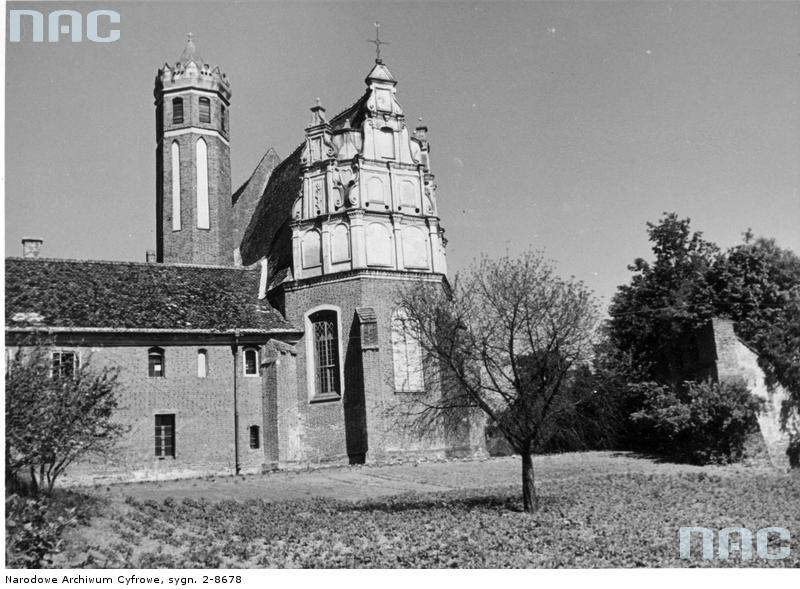 Przeworsk. Kościół św. Barbary - widok ogólny (1939-45)